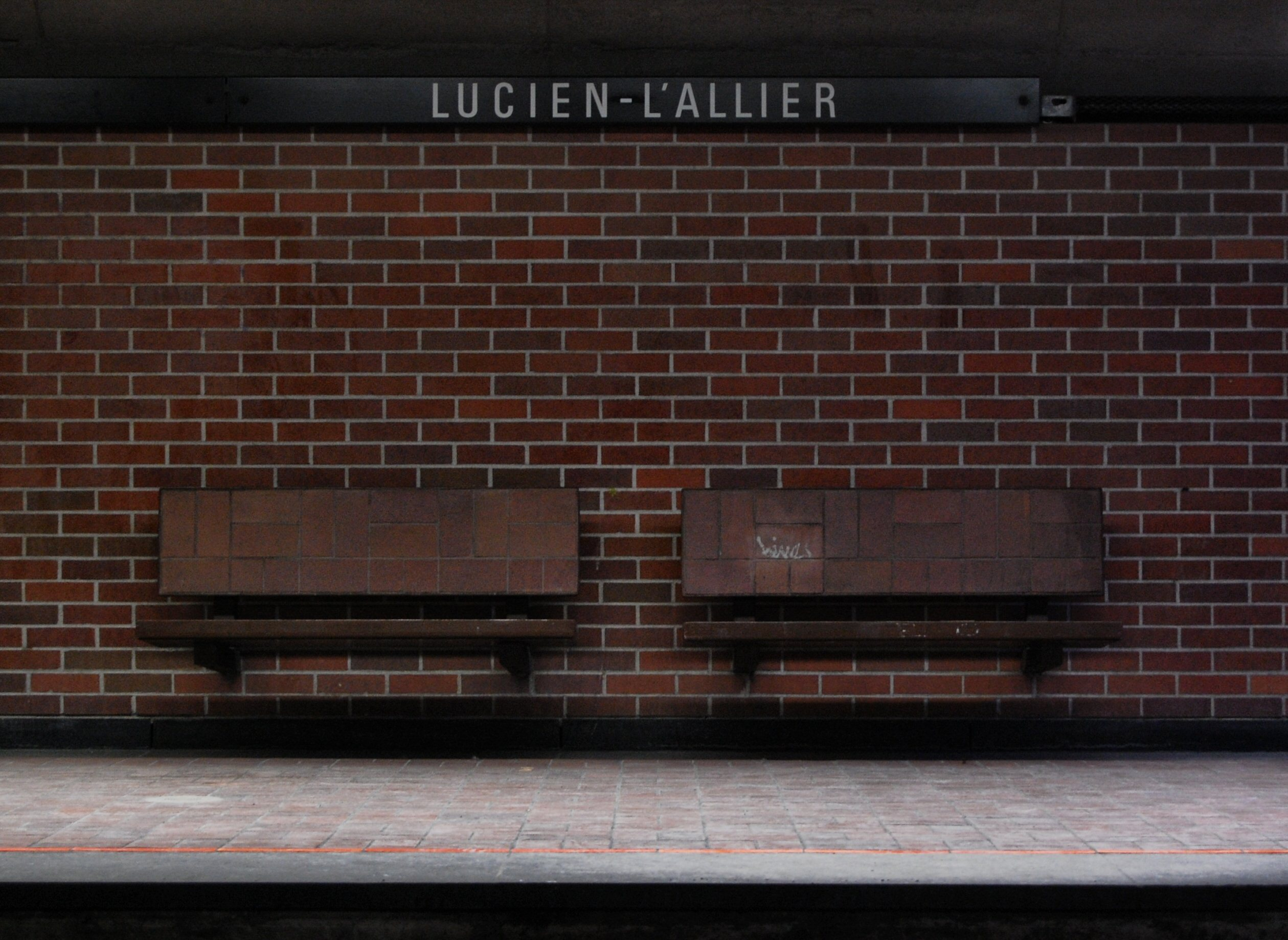 Bancs de la station Lucien-L'Allier du Métro de Montréal